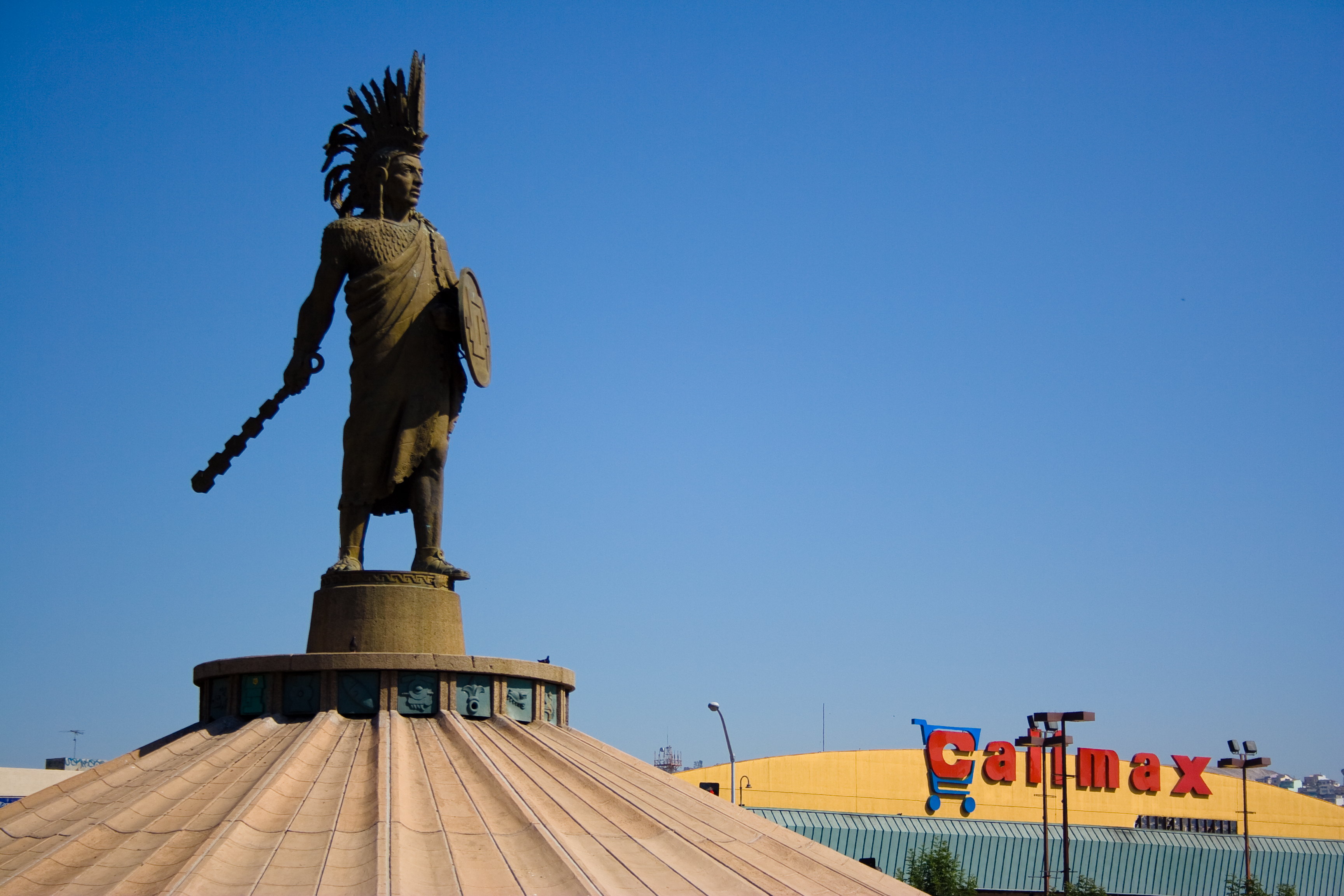 Glorieta y Monumento a Cuauhtemoc Tijuana